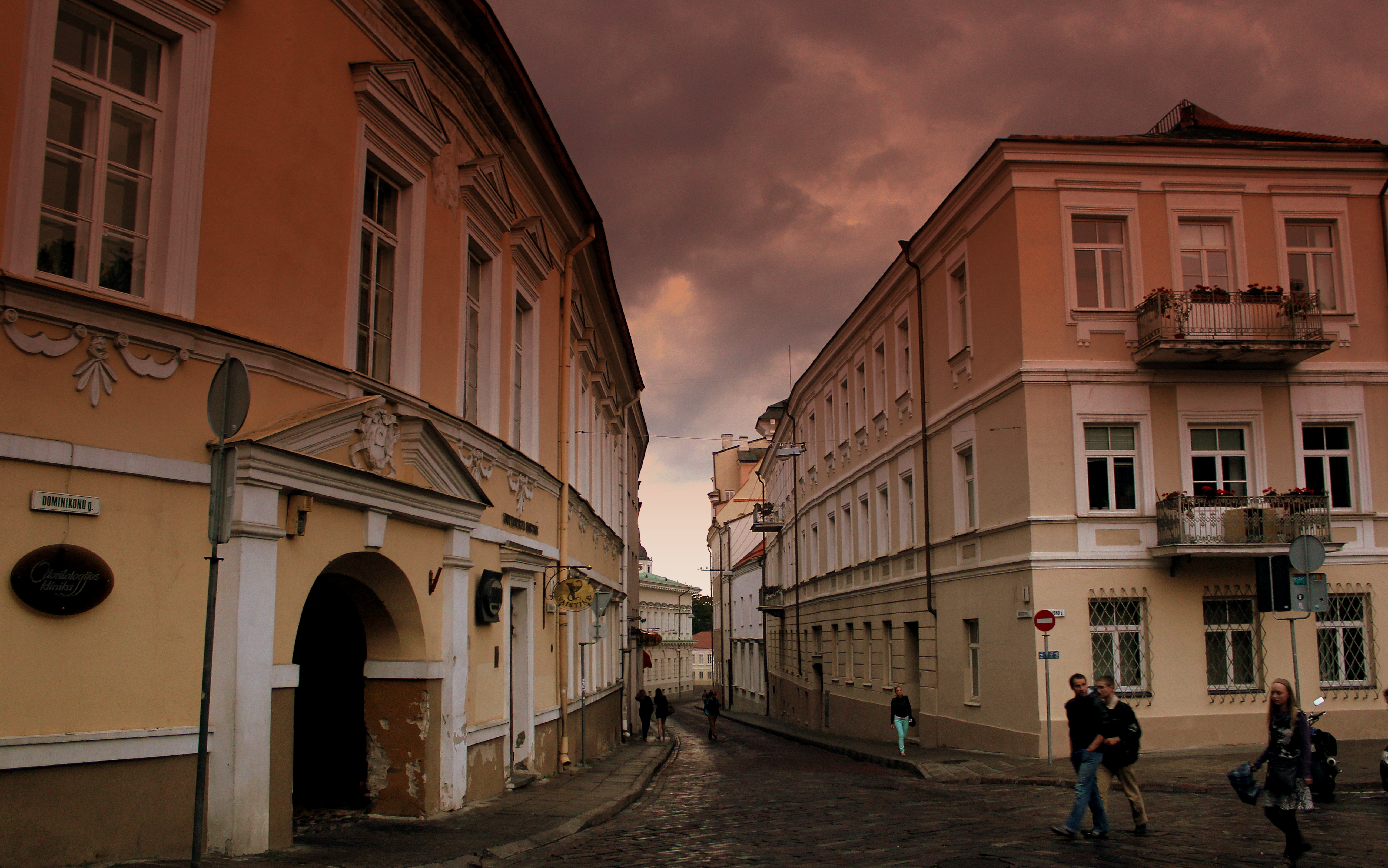 VILLINUS OLD TOWN LITHUANIA SEP 2013